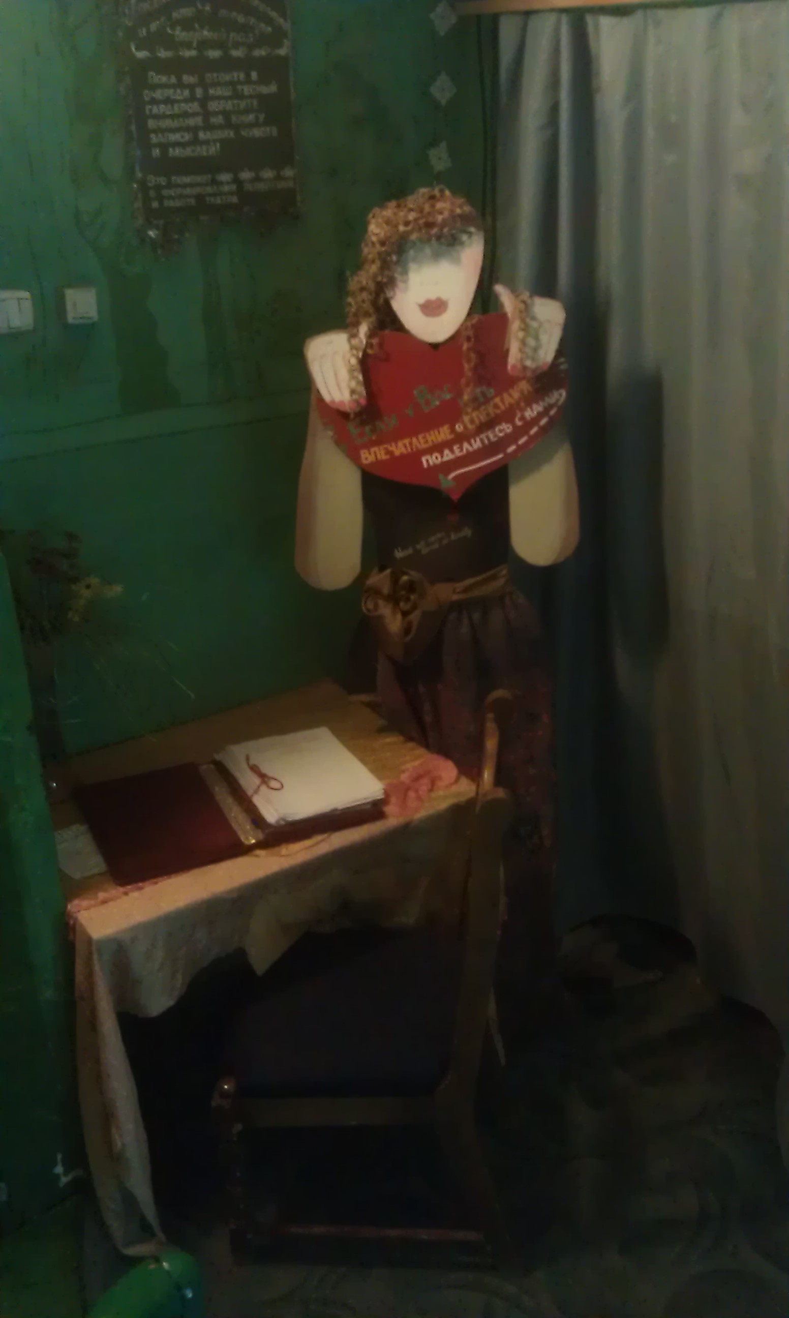 статуя в Томском камерном театре